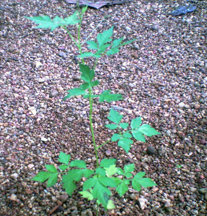 ദശപുഷ്പങ്ങളിലെ ഉഴിഞ്ഞയുടെ ചിത്രം സ്വയം എടുത്തത് )